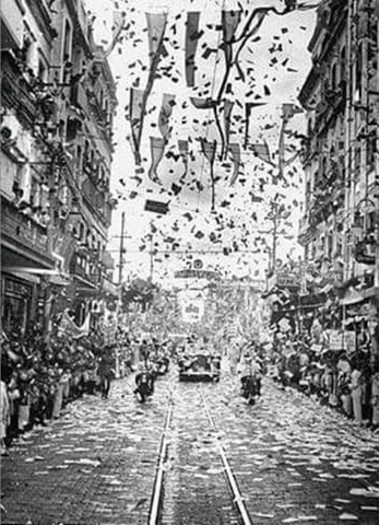 Recepção ao Presidente Getúlio Vargas no Recife - Rua Nova — Pernambuco, Brasil.